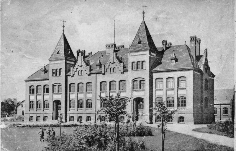 Gryfice, ul. Marszałka Jóżefa Piłsudskiego 1 - Gimnazjum nr 1 im. Żołnierzy Armii Krajowej